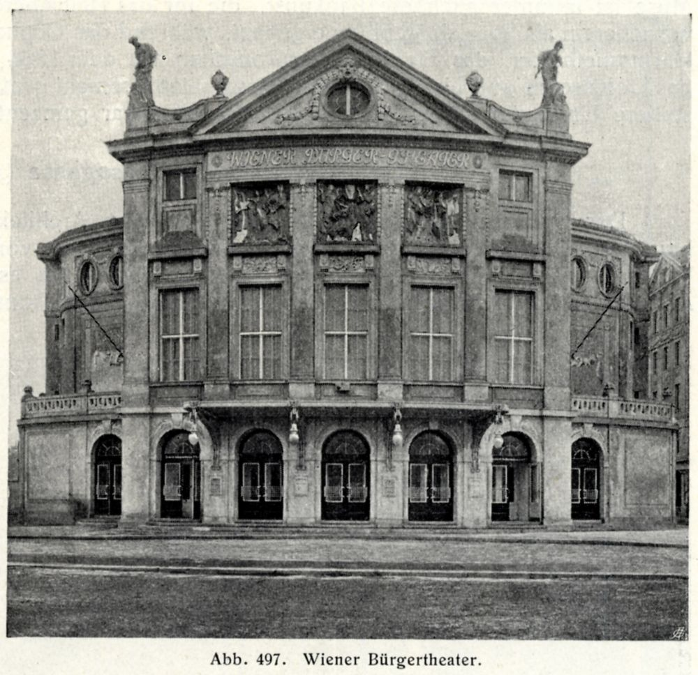 Das ehemalige Bürgertheater in Wien - Aussenansicht